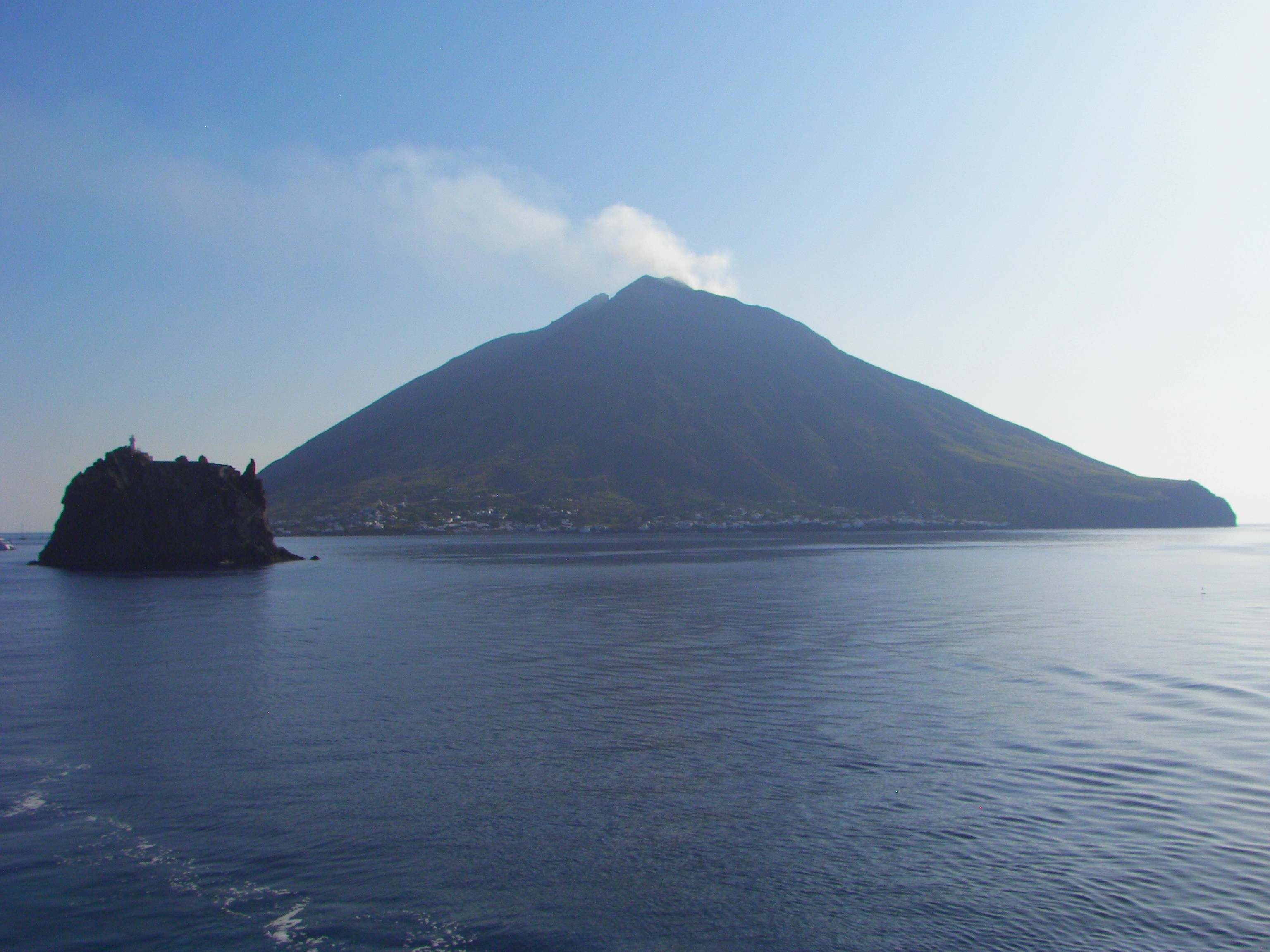 Stromboli und Strombolicchio